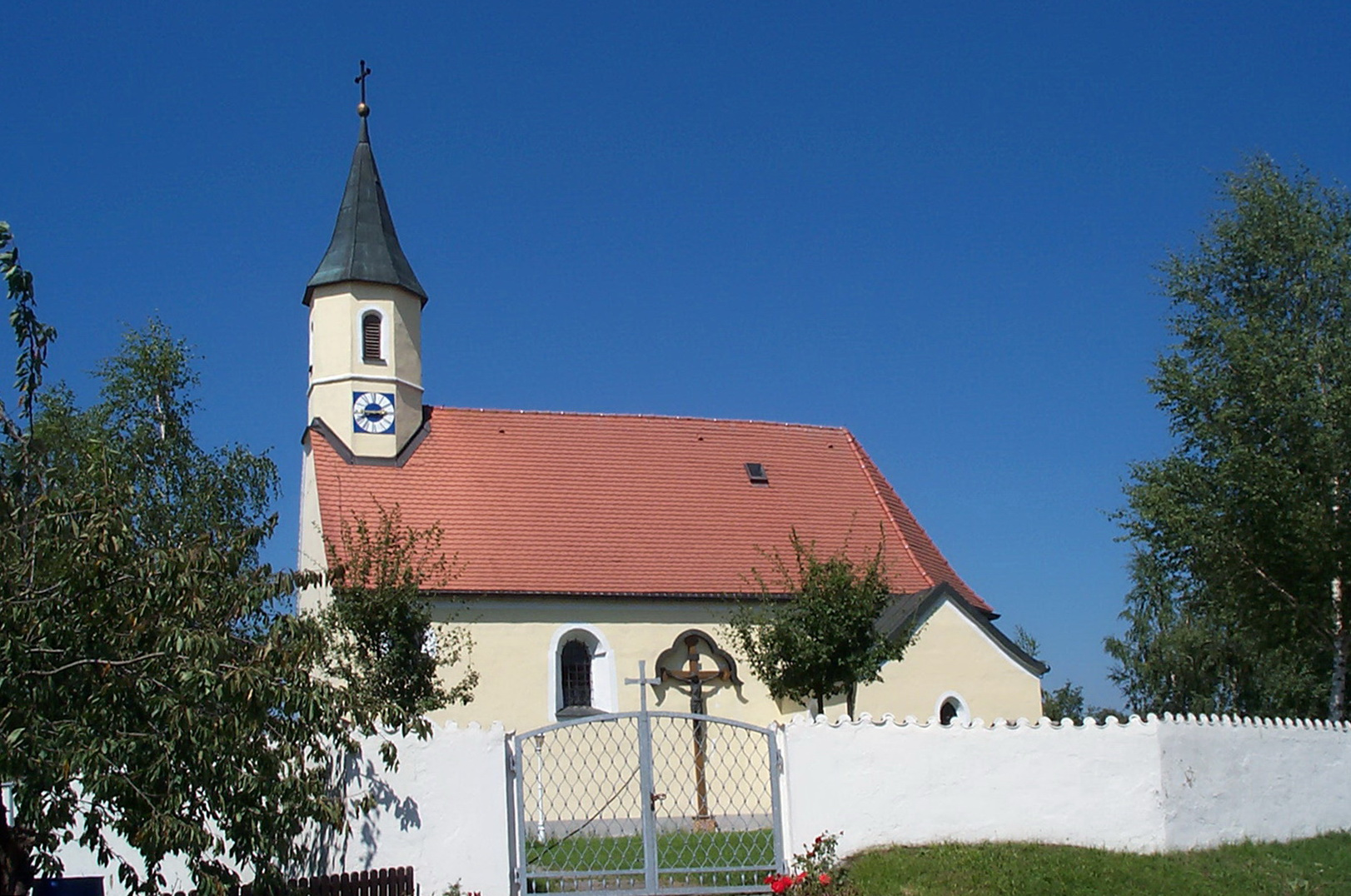 Wiesendorf, Filialkirche St. Johannes ev.